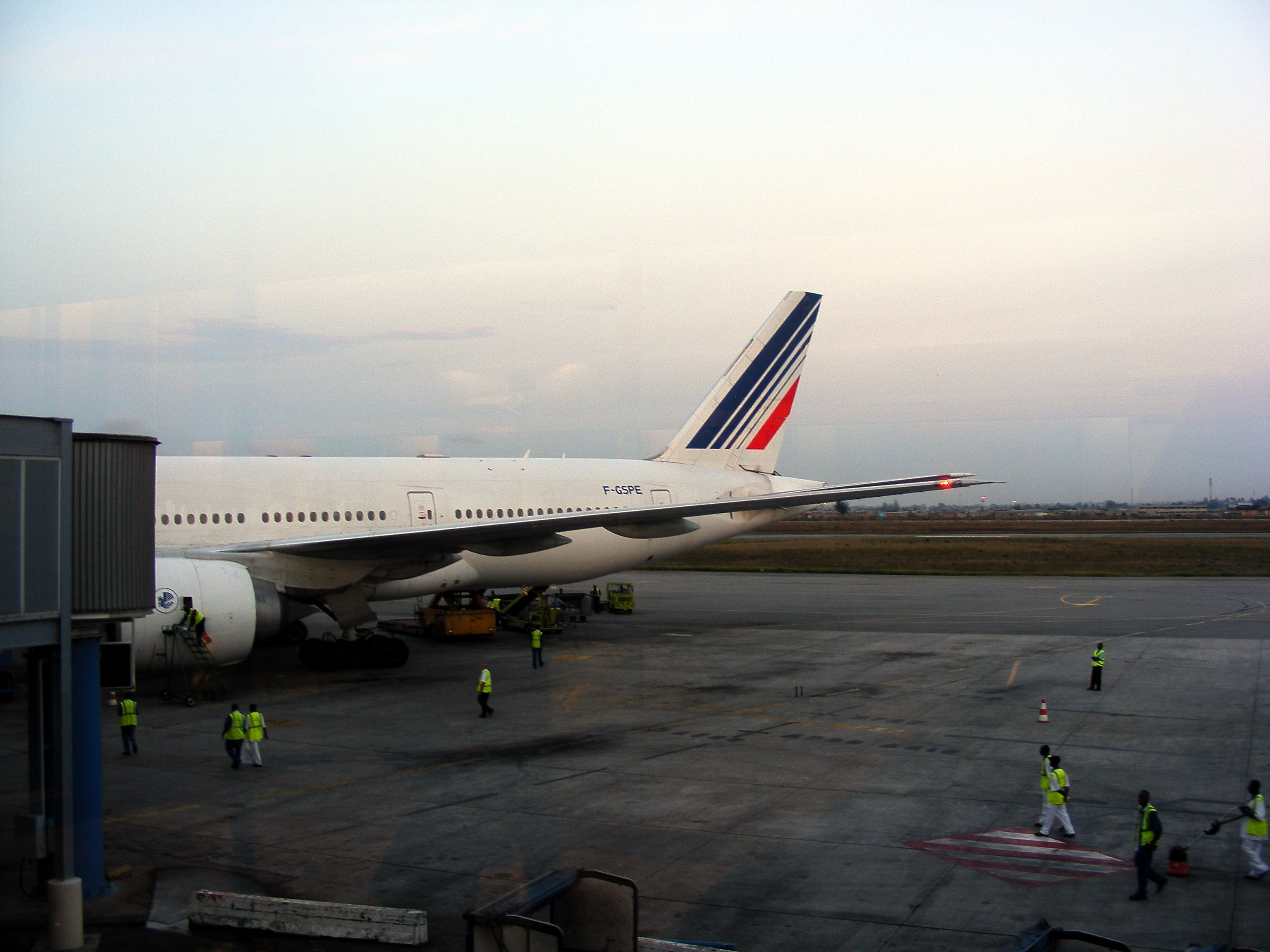 Vue du tarmac de l'aéroport Félix-Houphouët-Boigny depuis l'aérogare internationale. Un Boeing 777-228(ER) immatriculé F-GSPE d'Air France est en cours de préparation.